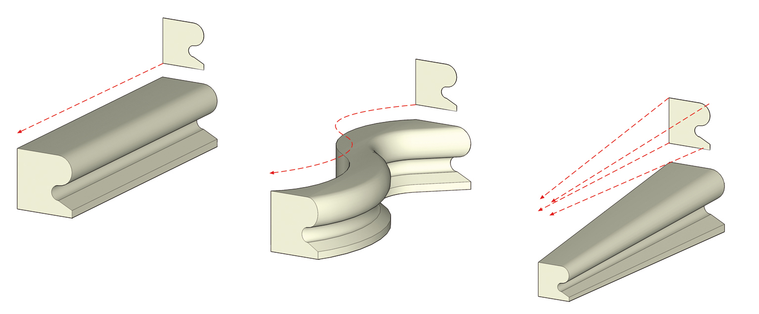 Las formas extrudidas quedan definidas por: • Una sección o perfil bidimensional (o más). • Una dirección o eje generador. Pero esa dirección puede ser recta, puede seguir una trayectoria curva, sinuosa, quebrada, etcétera(en este caso hablamos de barrido). El perfil también puede sufrir alteraciones conforme avanza en el recorrido, en el caso de la imagen un cambio de escala, pero podemos imaginar giros, transiciones de una forma a otra (en cuyo caso le llamamos solevación) u otros.